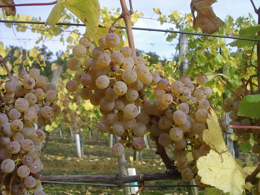 Petit manseng (Vitis vinifera) légèrement passerillé (vignoble de Monein, Pyrénées-Atlantiques)